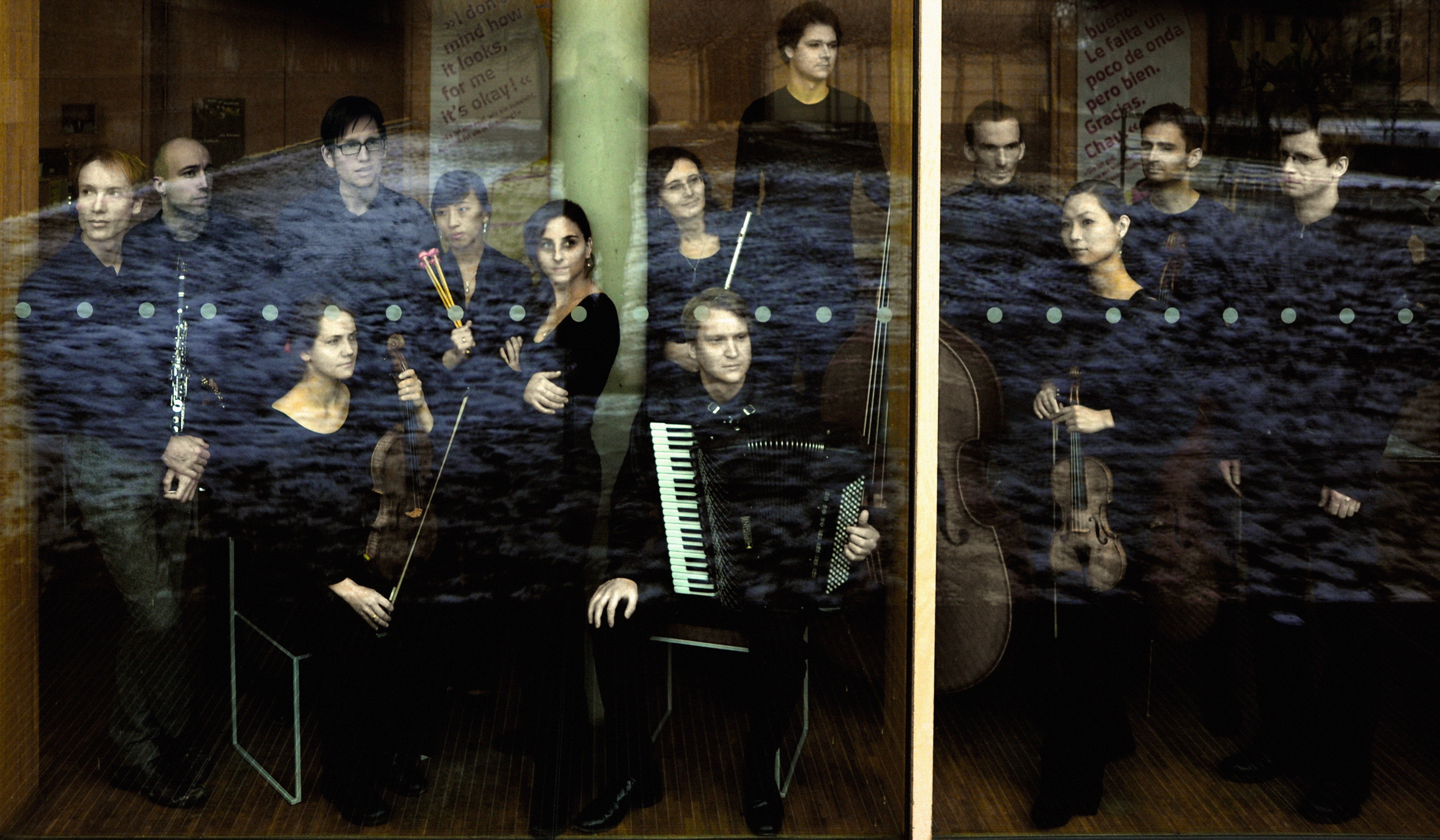 gruppenbild Ensemble El Perro Andaluz (Dresden)